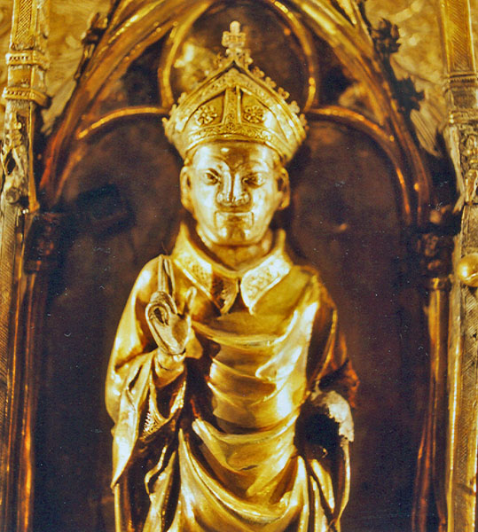 Arqueta de Sant Patllari. Església de Santa Maria de Camprodon. Ripollès